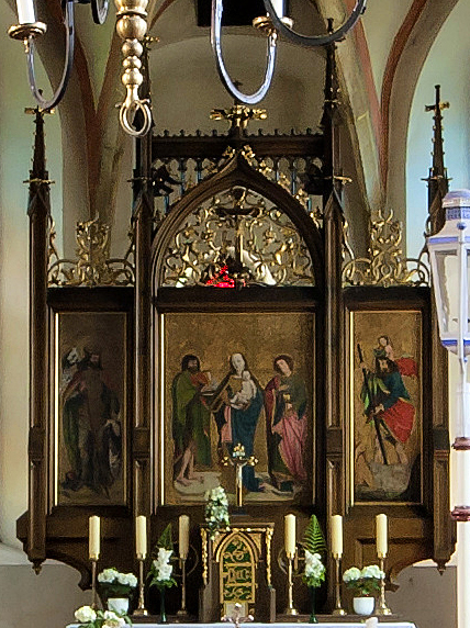 Kostel svatého Jana Křtitele, Mírové náměstí, Chudenice.